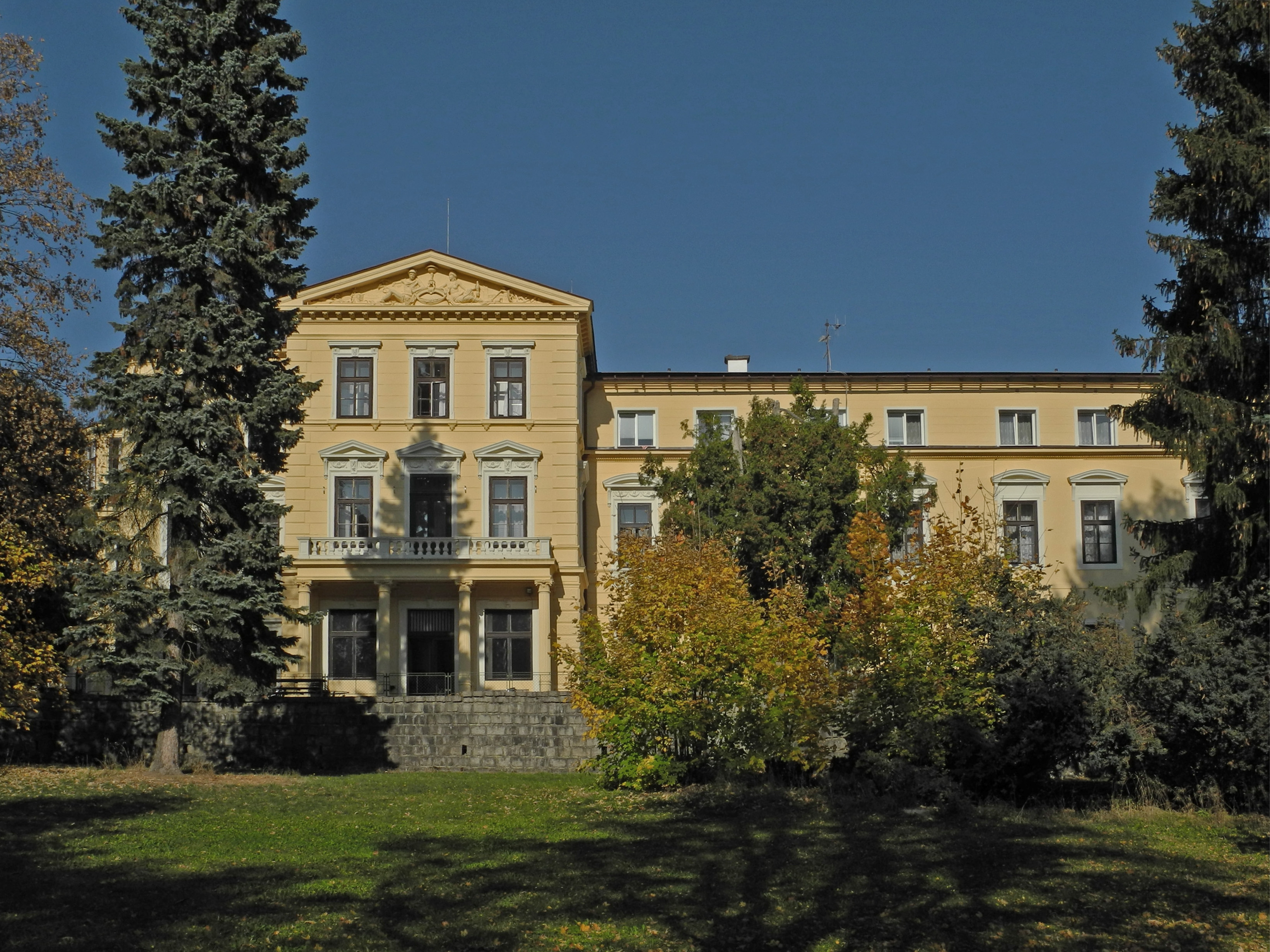 Gartenseite des Palais Schmitt in Böhmisch Aicha / Český Dub, Tschechien; Wohnsitz des Unternehmers Franz Ritter von Schmitt (1816–1883); errichtet 1873–1874 nach Entwurf des Architekten Gustav Sachers (1831–1874)